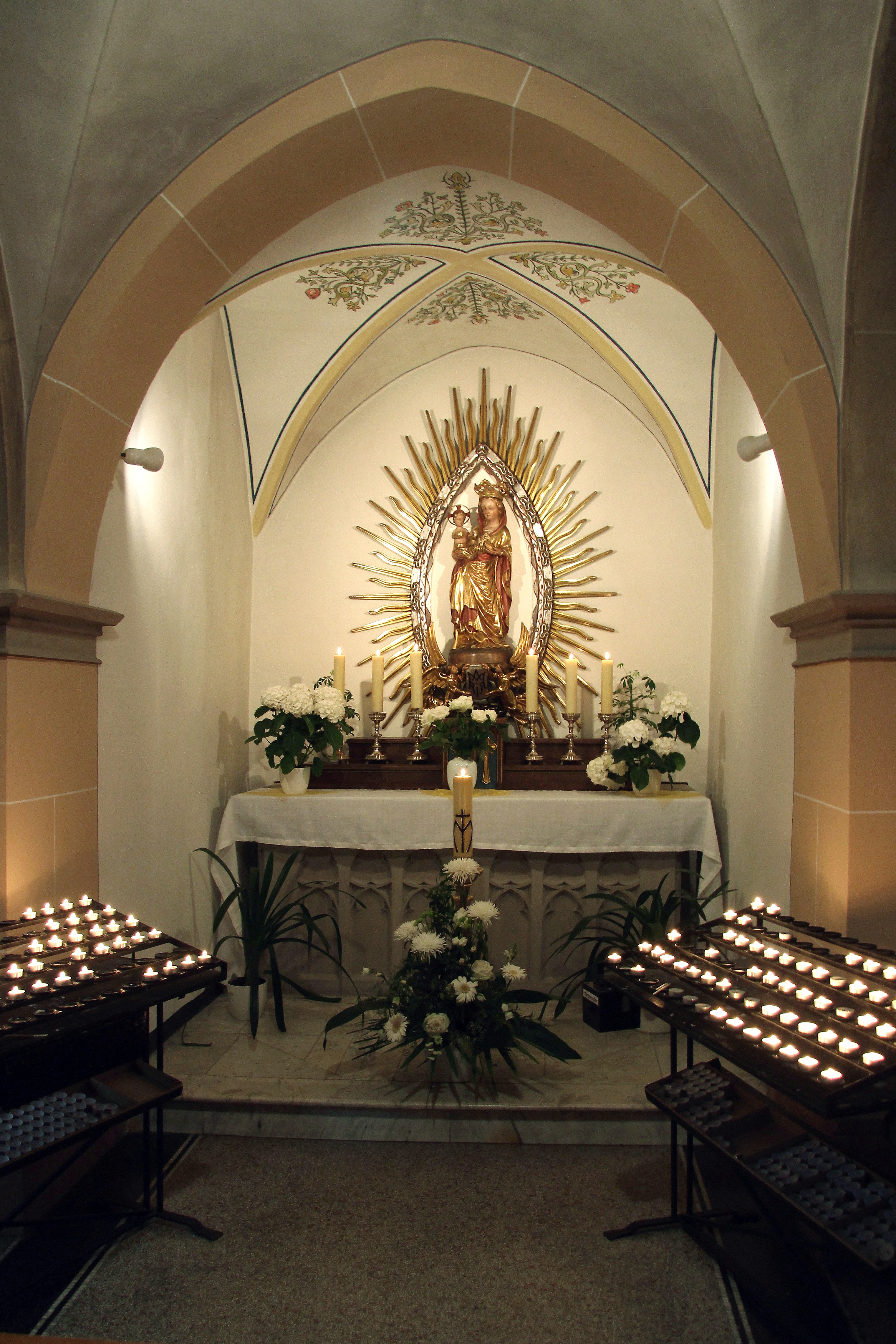 Kloster Maria Engelport im Flaumbachtal bei Treis-Karden, Seitenkapelle mit Gnadenbild (vor den Veränderungen durch die neuen Eigentümer)